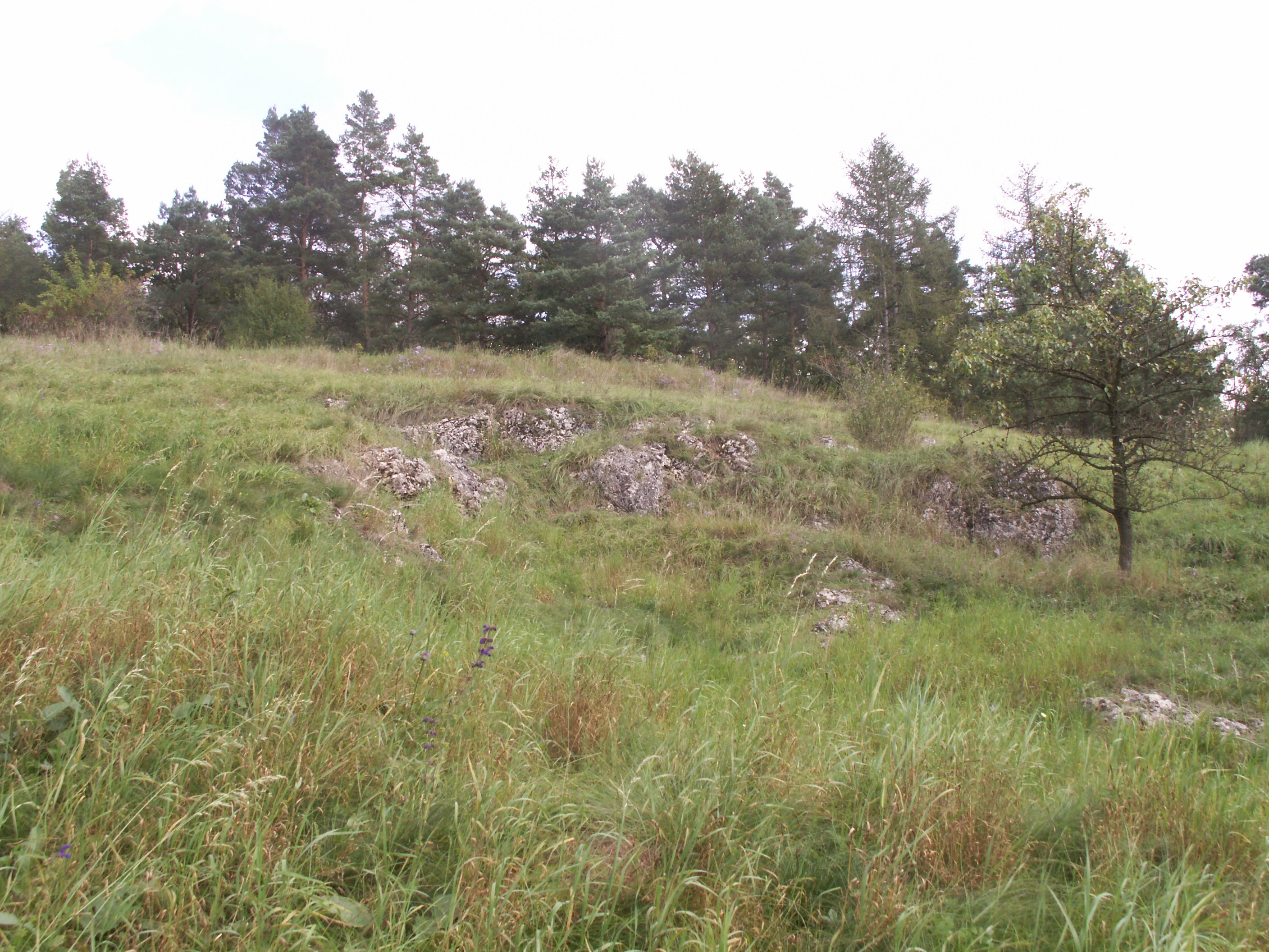 Přírodní památka Na lesní horce, okres Brno-venkov, výchozy devonských vápenců